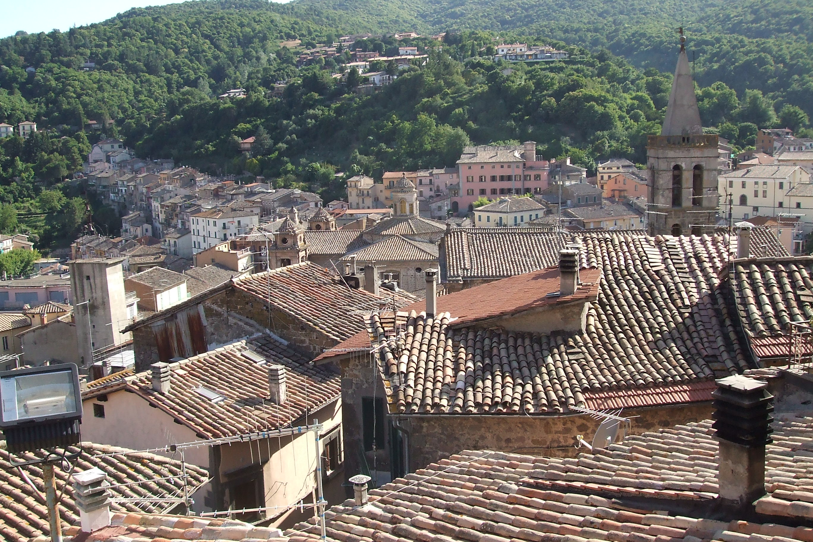 Soriano. Volapük: Kasted di Soriano.